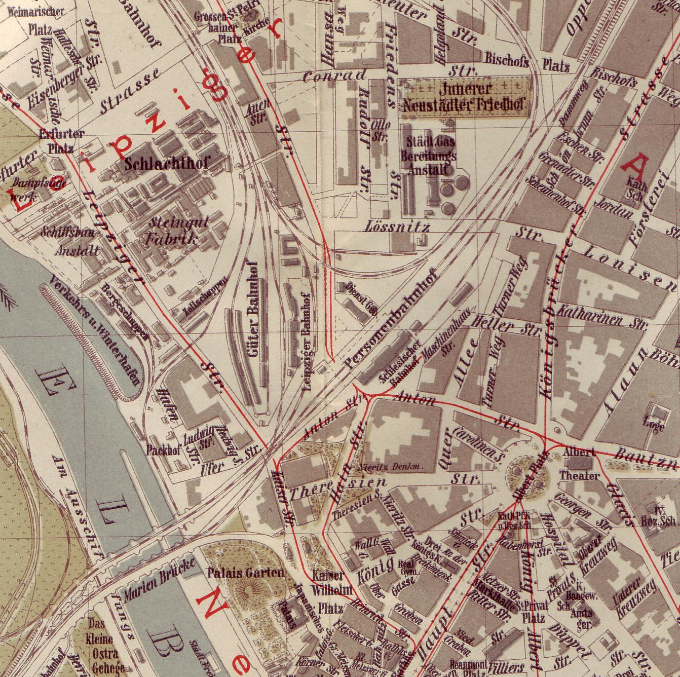 Karte der Dresdner Neustadt mit Leipziger und Schlesischer Bahnhof